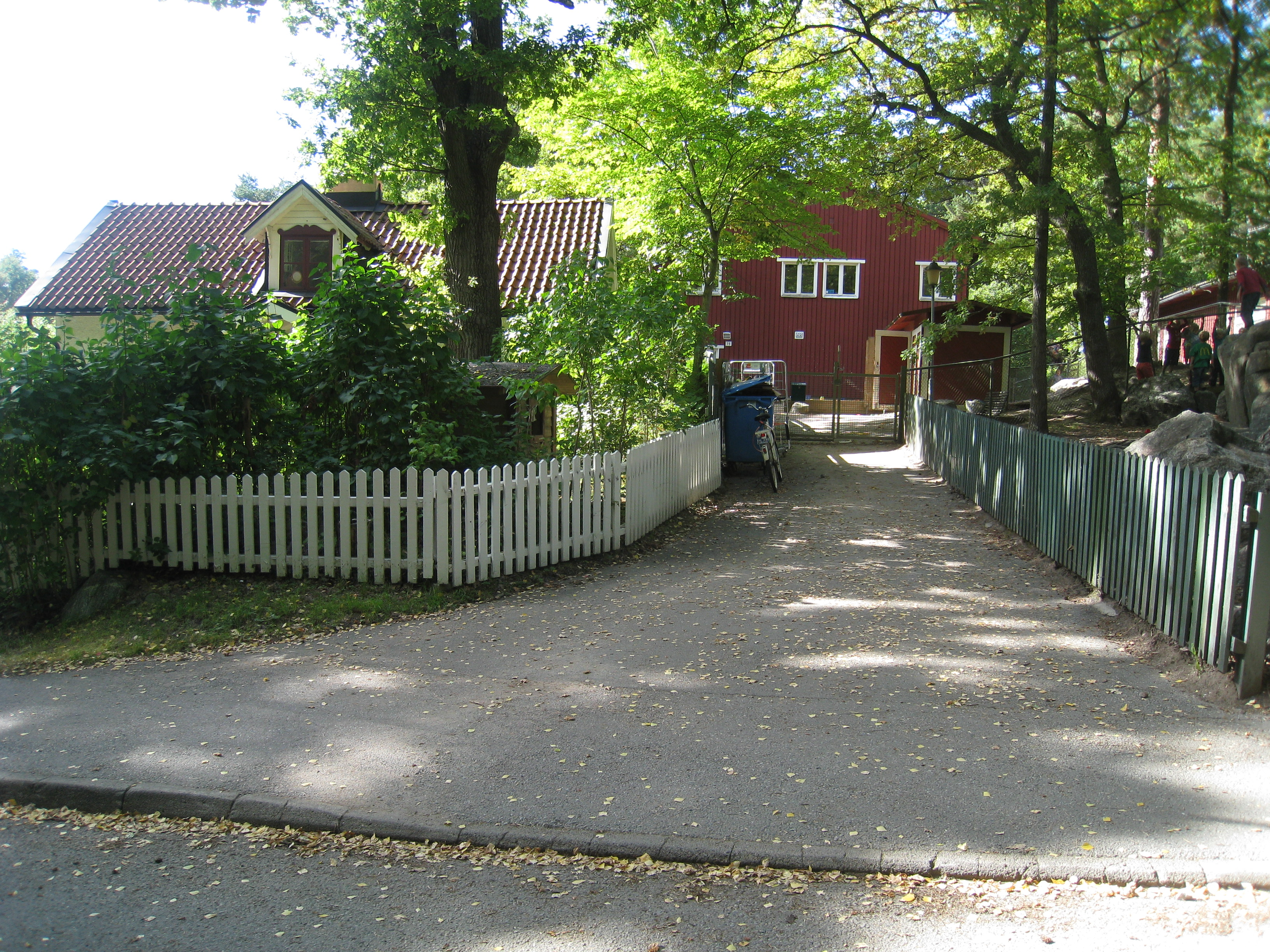 Olovslunds torp, Olovslundsvägen 19A i Olovslund i Bromma, väster om Stockholm. Torpets tak syns till vänster och Olovslundsskolans förskolebyggnader på Olovslundsvägen 19 syns till höger.